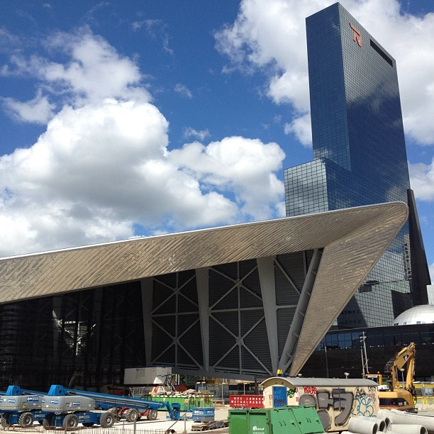 Station Rotterdam Centraal in juli 2012.